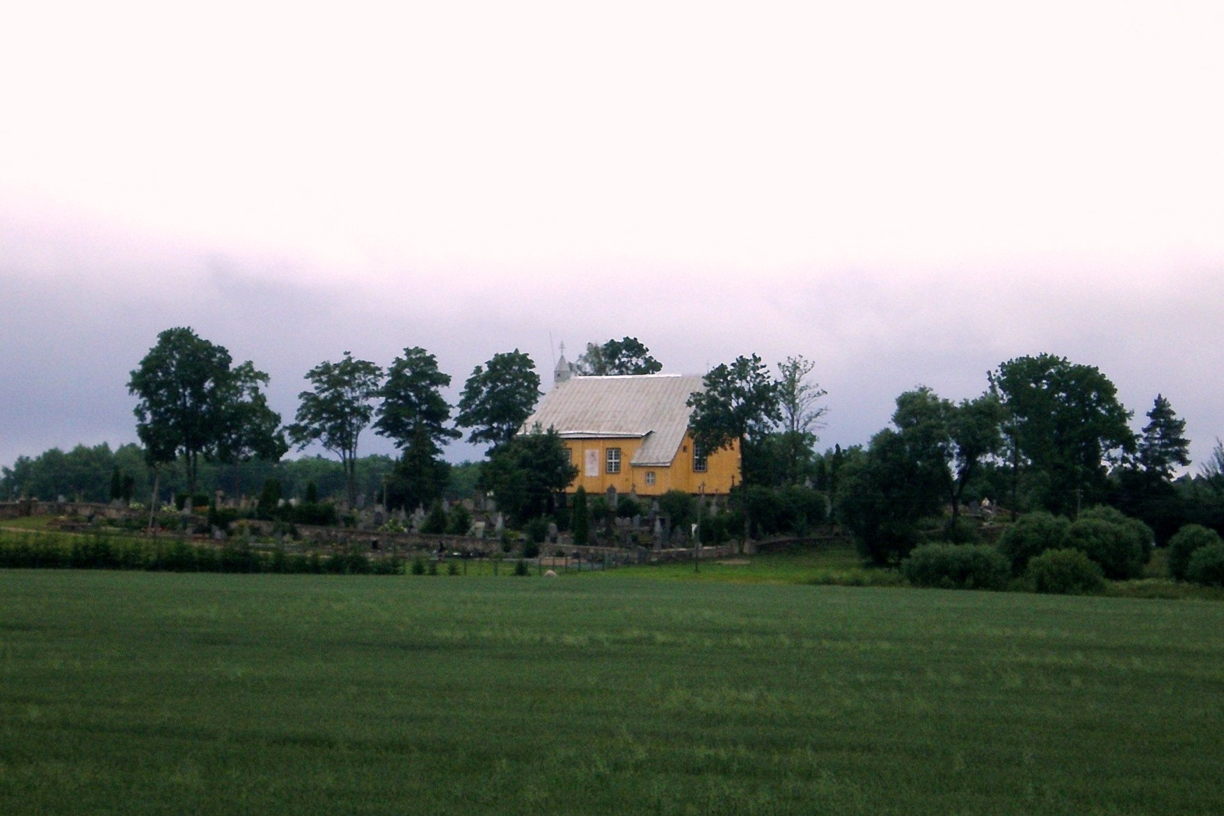 Lesčių bažnyčia, Raseinių raj.